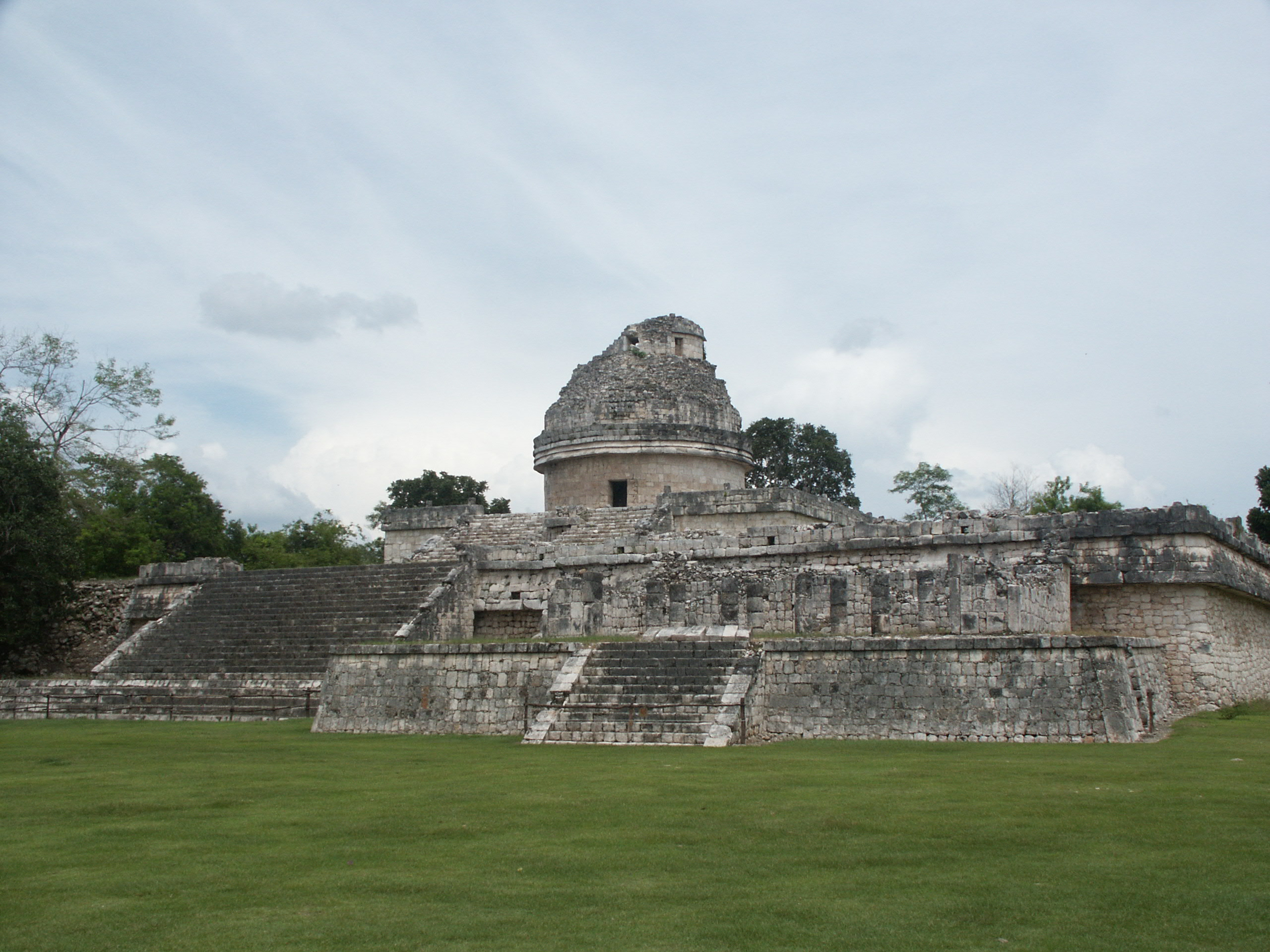 ユカタン半島にあるマヤの遺跡チチェン・イッツアの天文台跡。俗称「El Caracol(カタツムリ)」